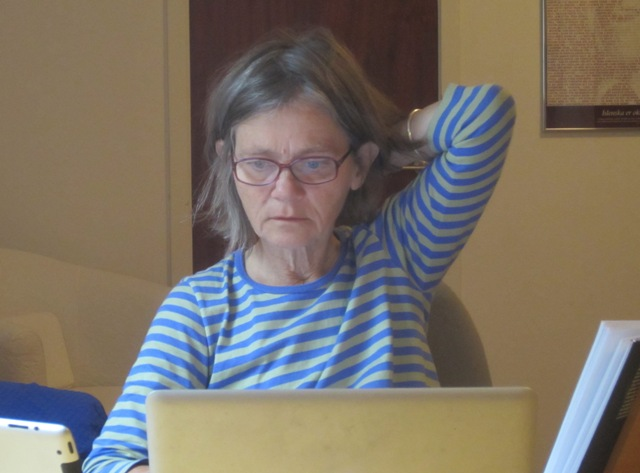 Fotot taget i författarförbundets hus i Reykjavik 17sept14